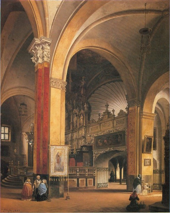 Interno della Basilica di sant'Eustorgio prima dei suoi restauri del 1841title QS:P1476,it:"Interno della Basilica di sant'Eustorgio prima dei suoi restauri del 1841" label QS:Lit,"Interno della Basilica di sant'Eustorgio prima dei suoi restauri del 1841"